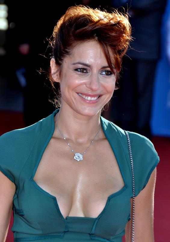 Audrey Dana au festival du film américain de Deauville